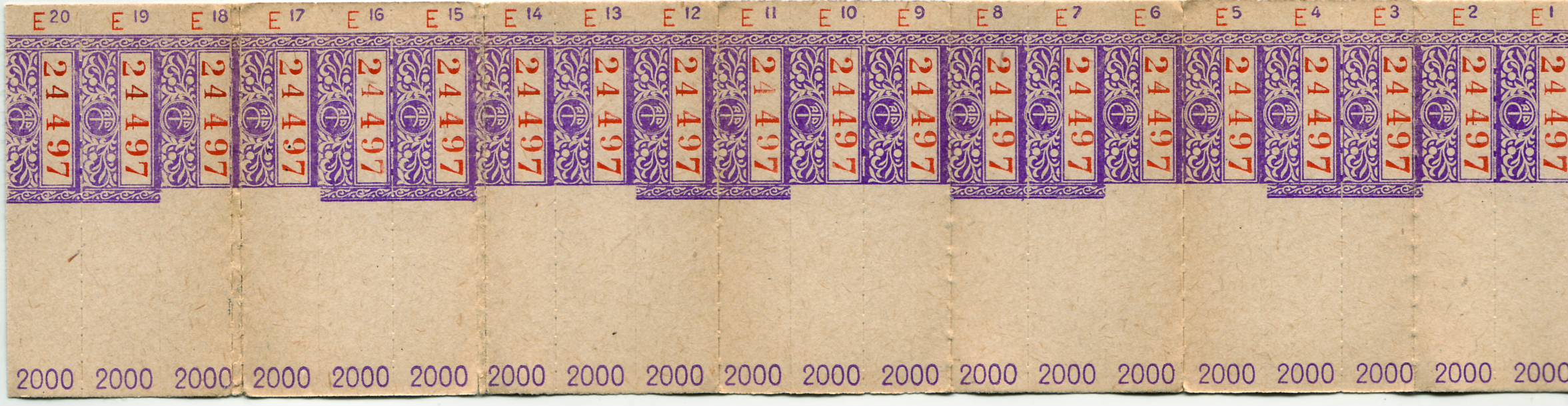 Billets de bus de la STCRP